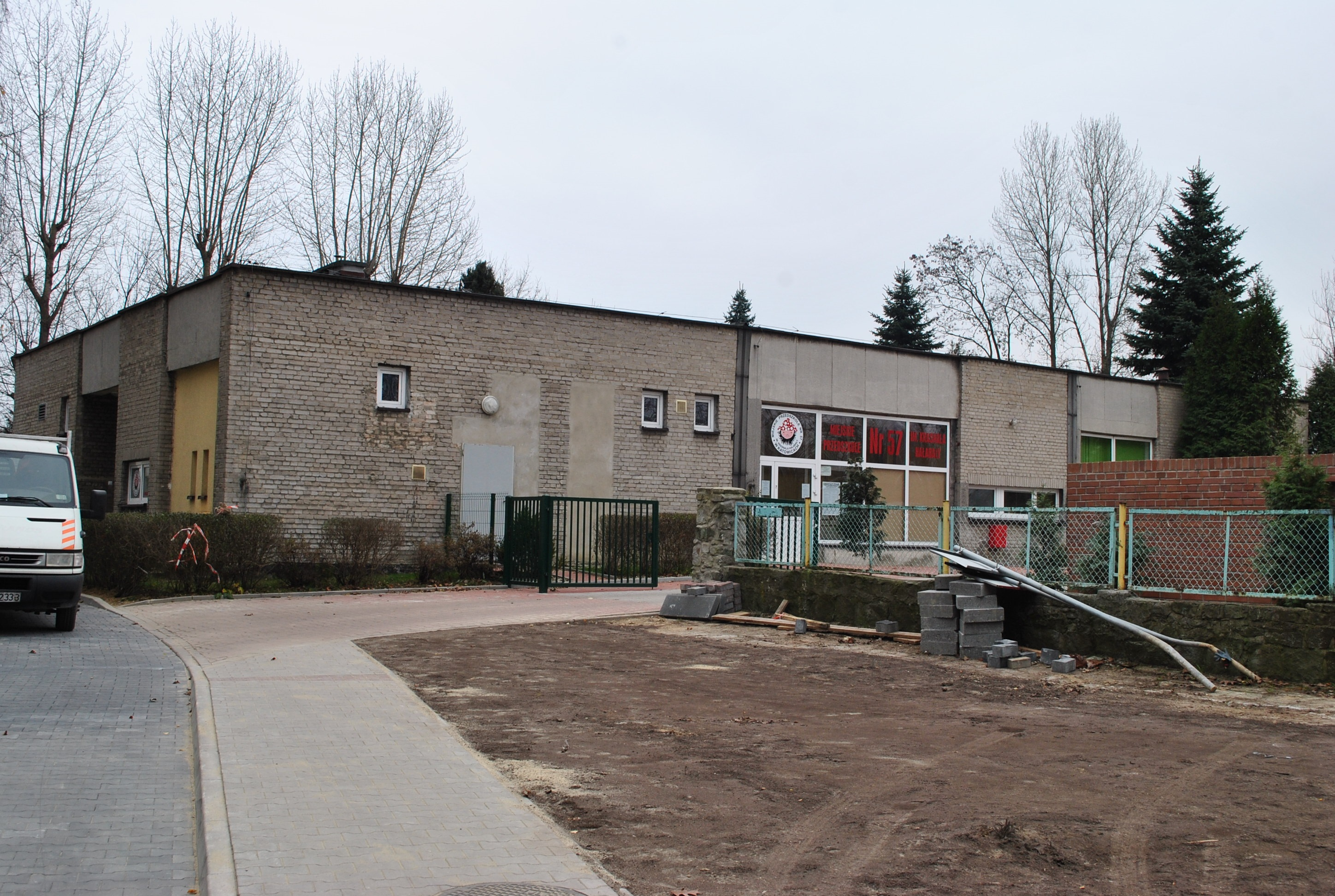 Katowice, Osiedle Tysiąclecia. Miejskie Przedszkole nr 57 im.Krasnala Hałabały